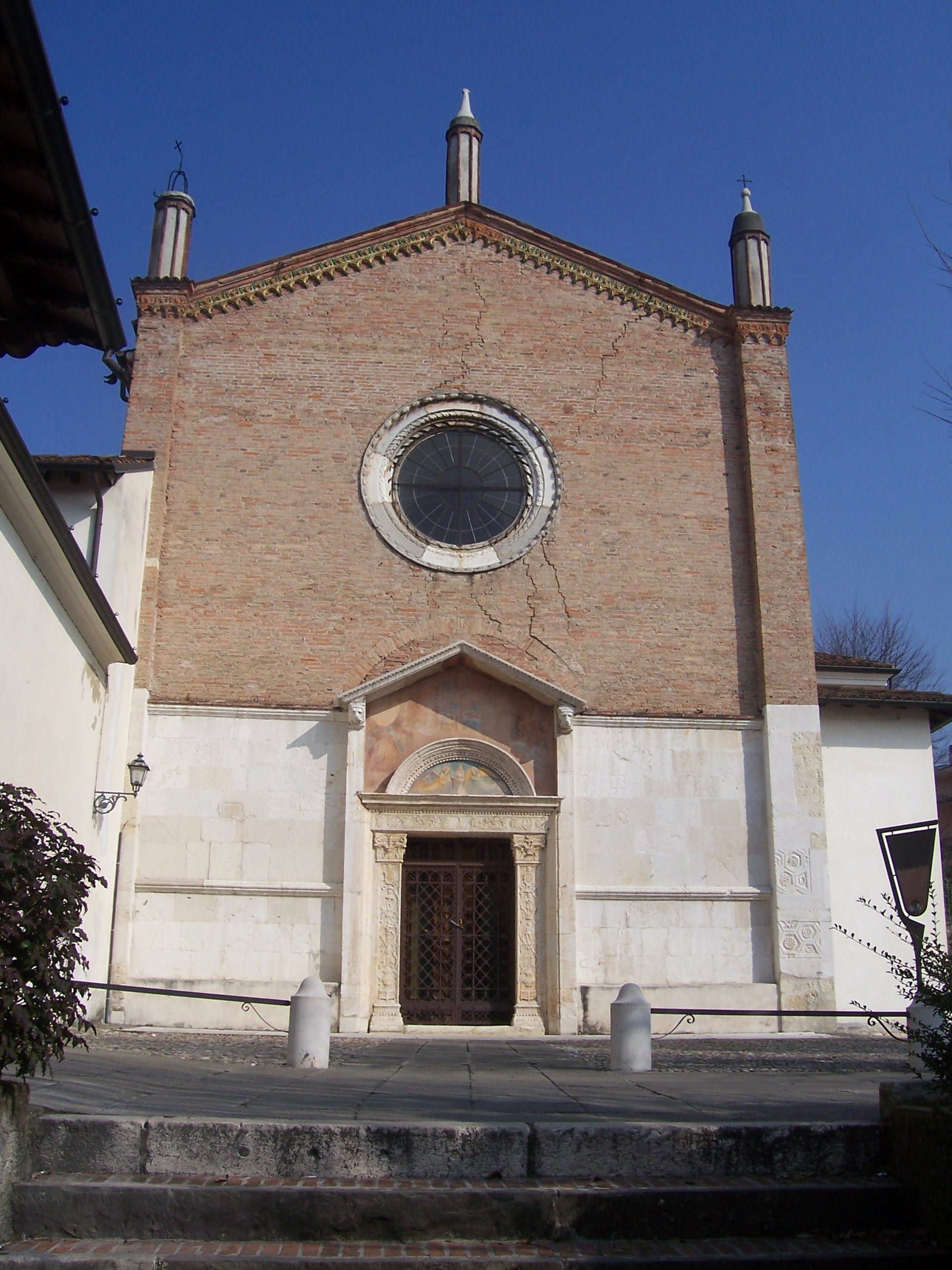 santissimo corpo di cristo brescia facciata.jpg